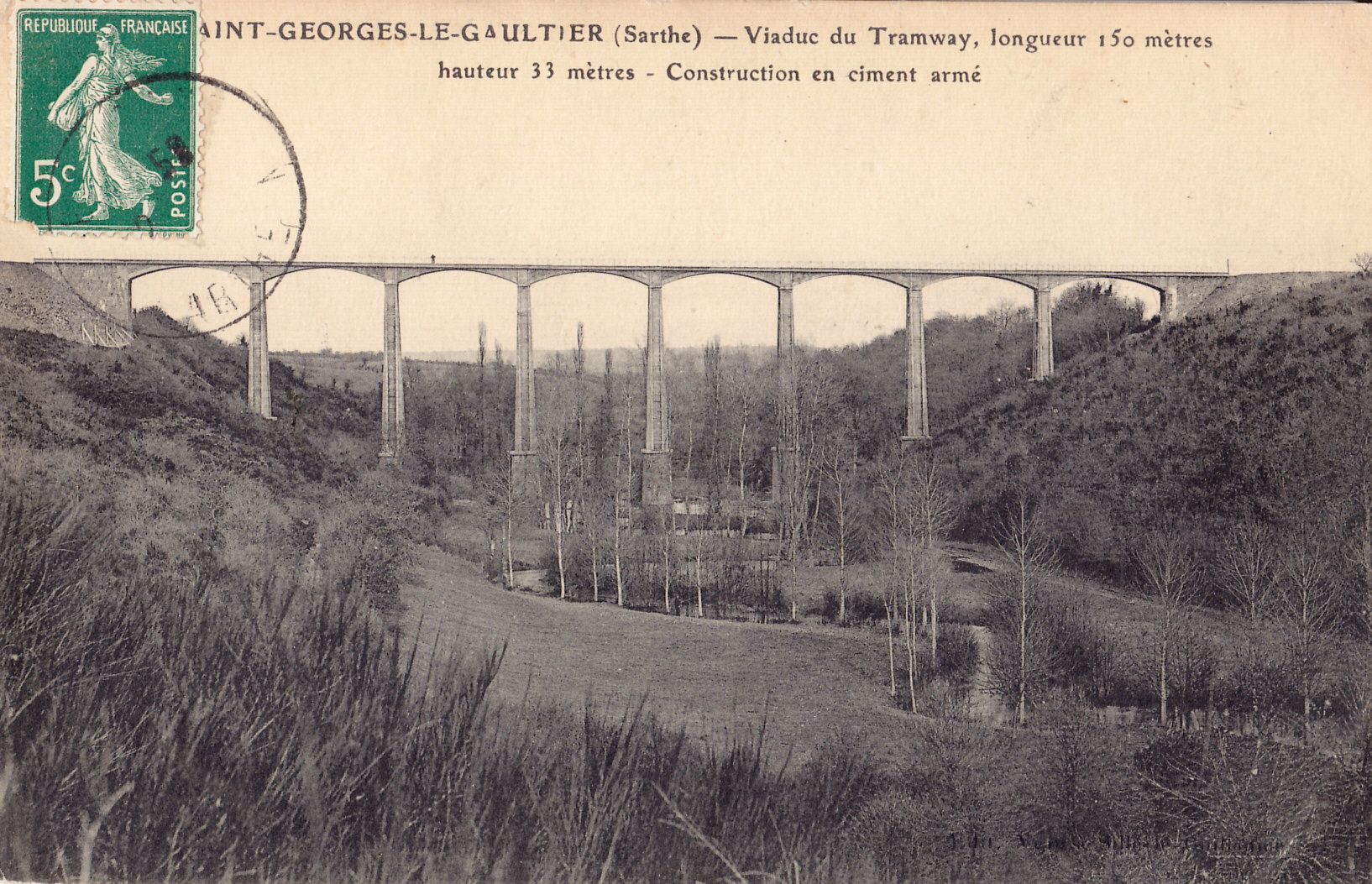 Carte postale ancienne sans mention d'éditeur : SAINT-GEORGES-LE-GAULTIER - Viaduc du Tramway, longueur 150 mètres, hauteur 33 mètres - Construction en ciment armé